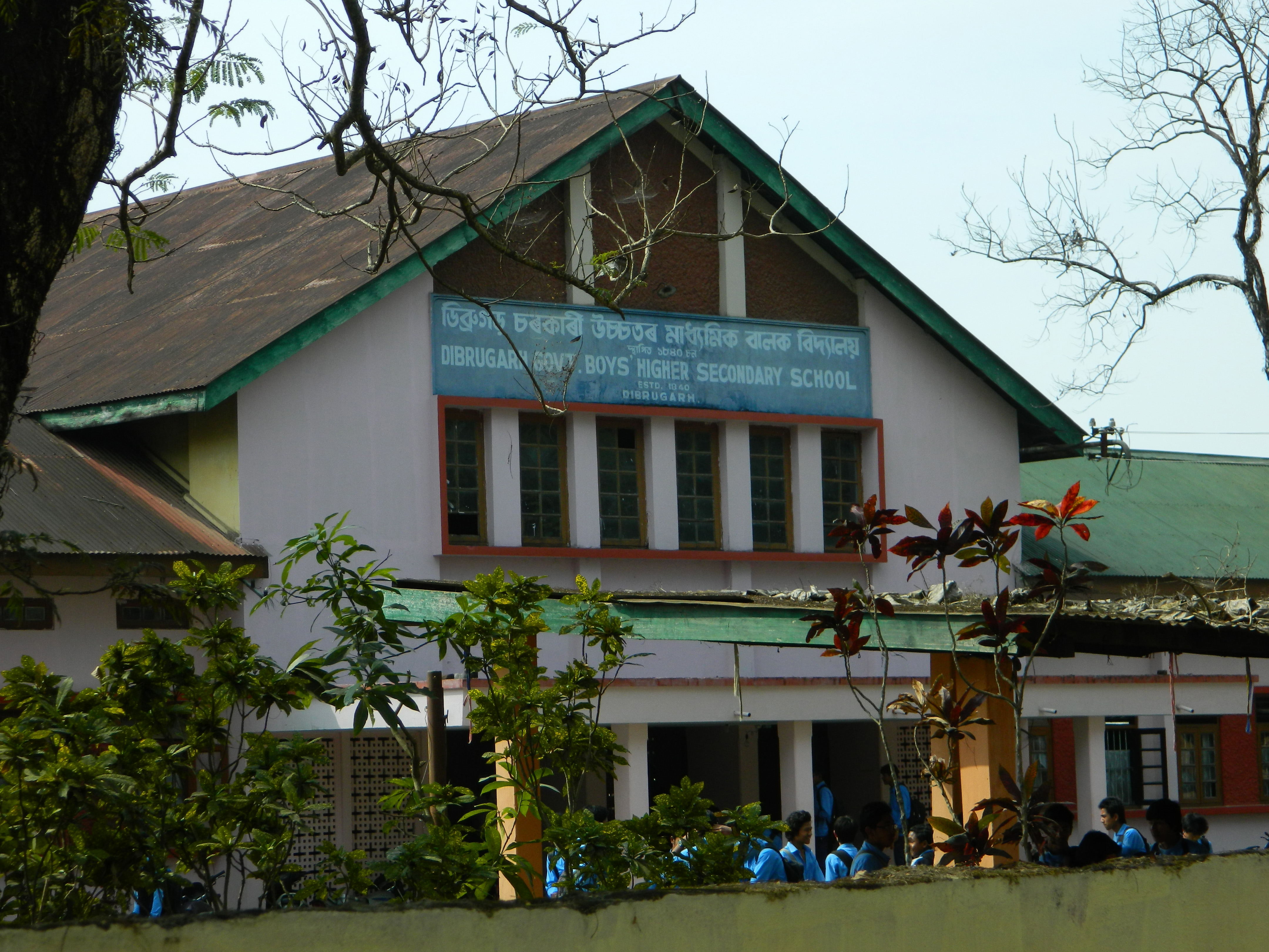 Dibrugarh Govt. Boys' H. S. School, Dibrugarh